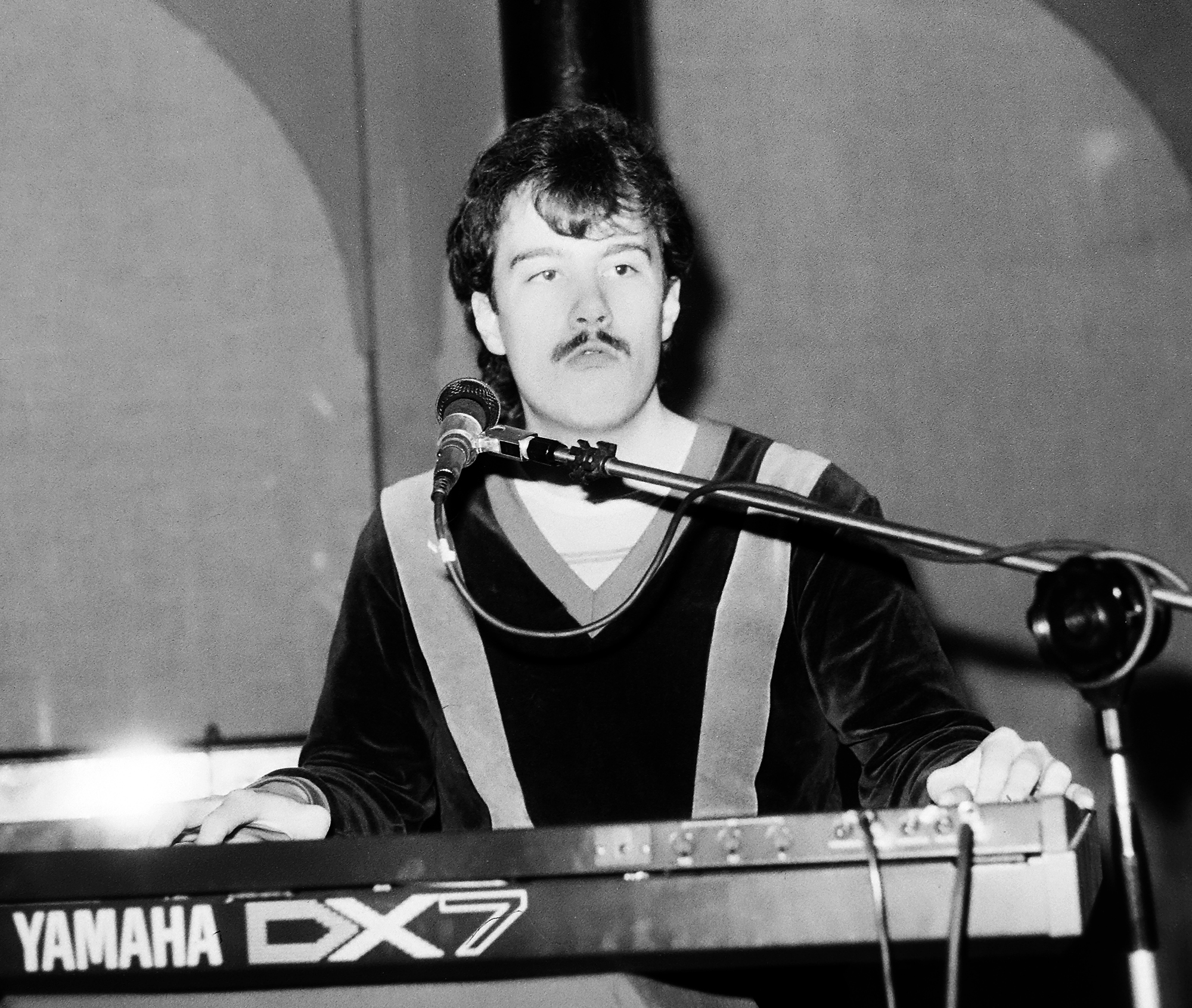 Lauri Laubre, muusikaärimees 85